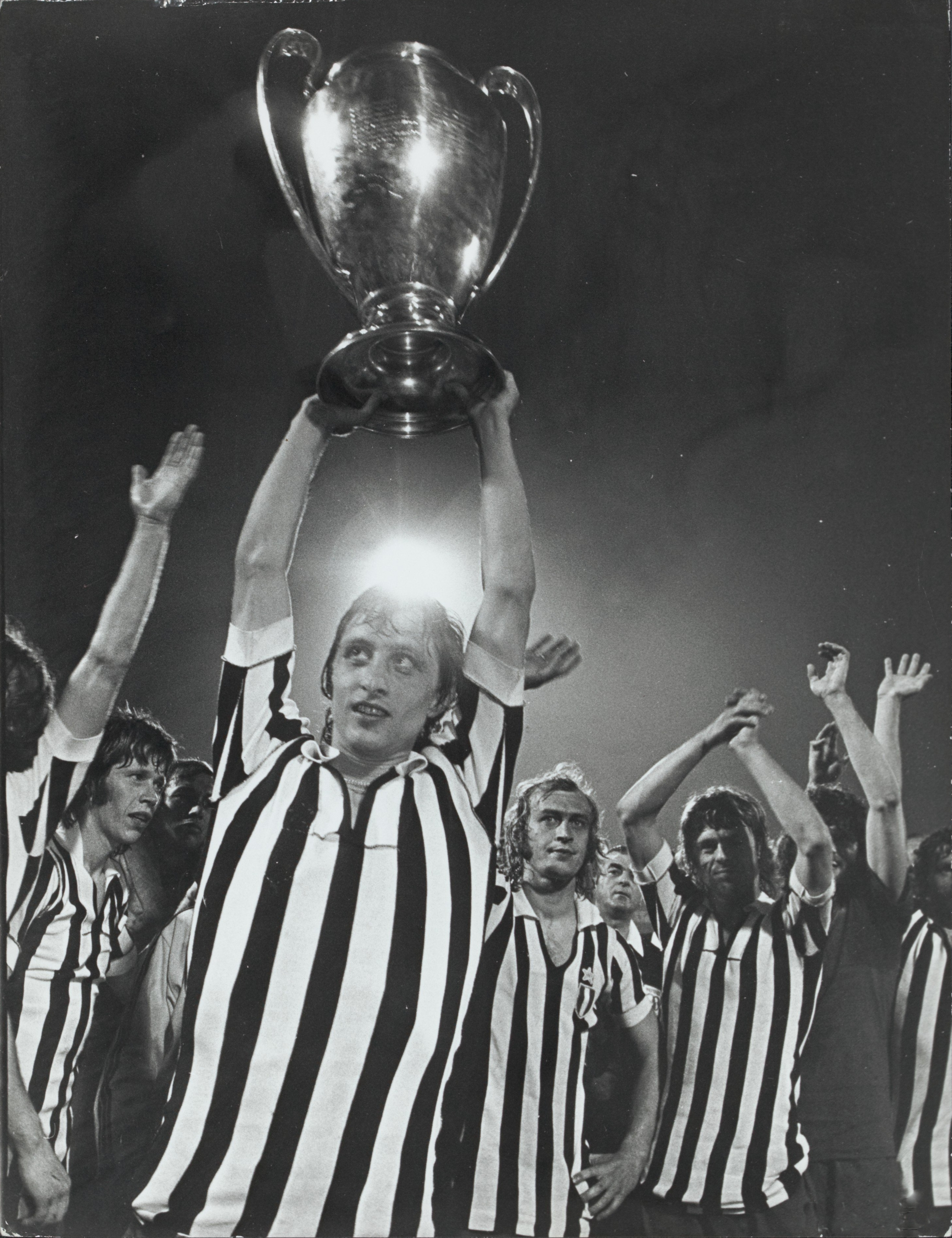 Collectie / Archief : Fotocollectie Rijksvoorlichtingsdienst Eigen Reportage / Serie : [ onbekend ] Beschrijving : europacupfinale ajax-juventus 30-05-1973 te belgrado Datum : 3 mei 1973 Locatie : Belgrado Trefwoorden : bekers, sport, voetbal Persoonsnaam : Cruijff, Johan, Juventus Fotograaf : Fotograaf Onbekend / Anefo Auteursrechthebbende : Nationaal Archief Materiaalsoort : Foto (zwart/wit) Nummer archiefinventaris : bekijk toegang 2.24.10.02 Bestanddeelnummer : 135-0609